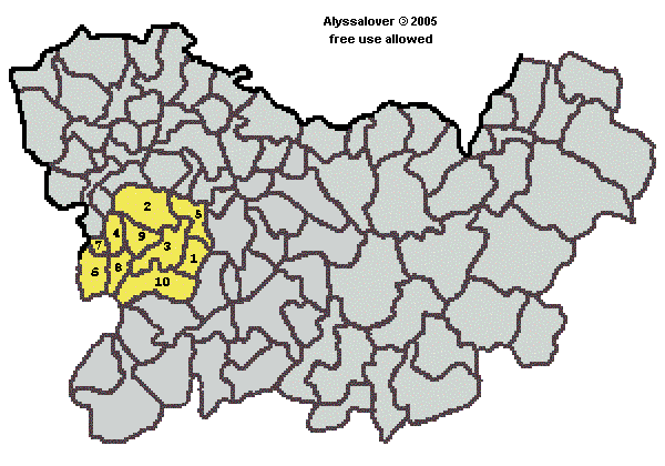 Mapa coa localización da Comarca da Terra de Celanova.